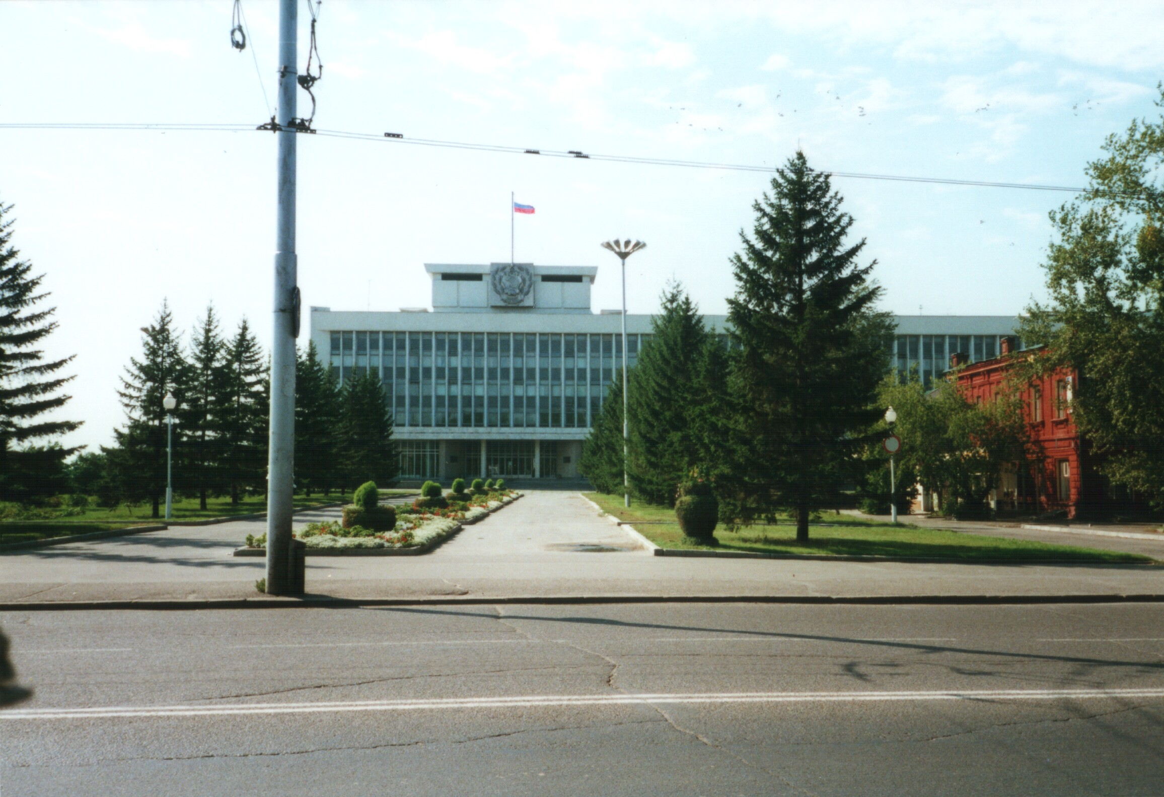 Das "weiße Haus" in Tomsk